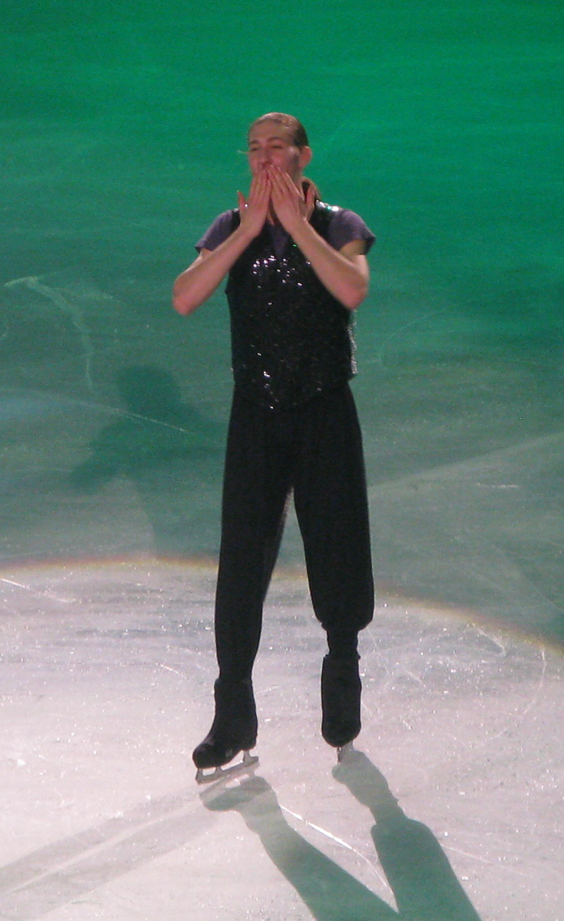 Jason Brown lors du gala du trophée Éric Bompard 2013 à Paris-Bercy.